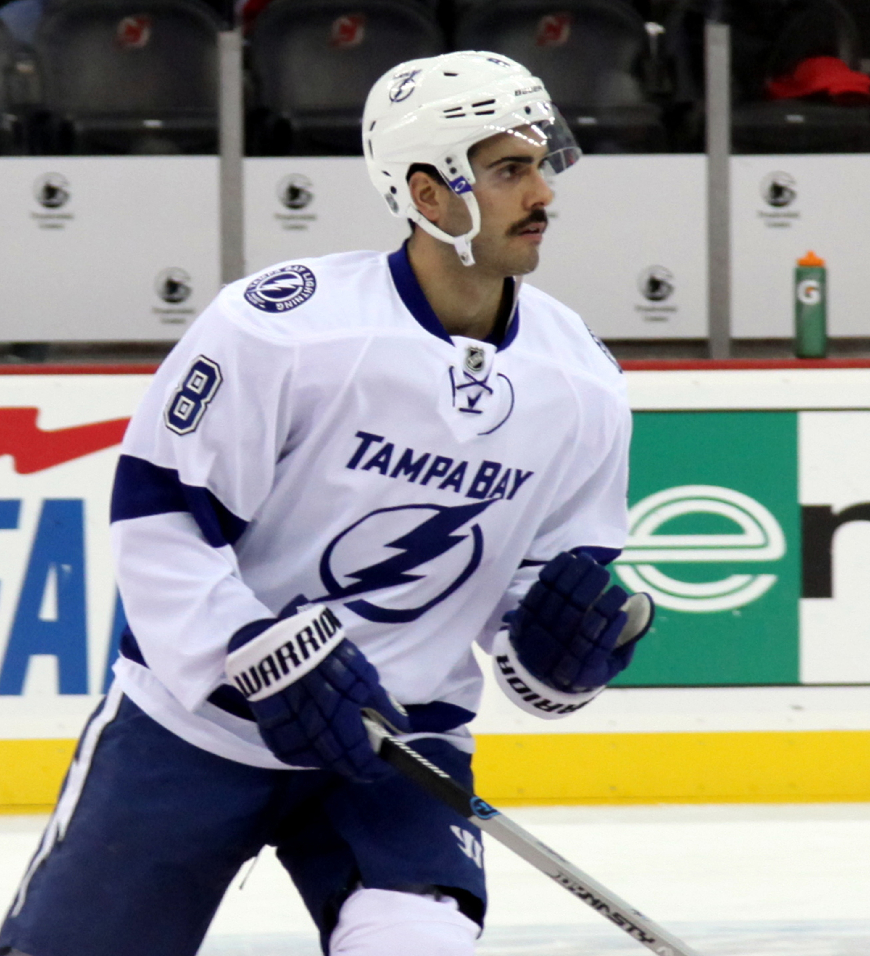 Mark Barberio in December 2014.